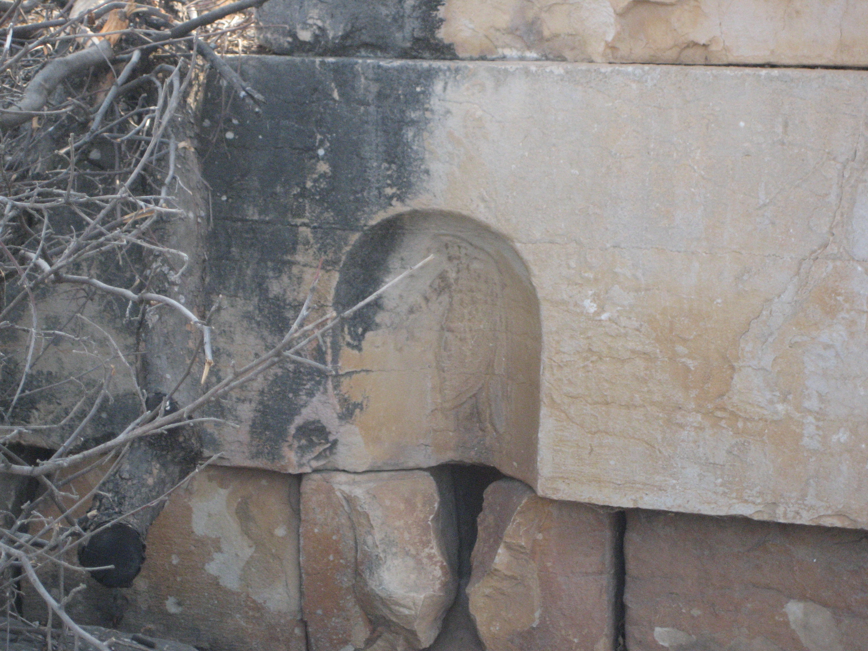 גומחה להזרמת דם קורבנות לתוך המקדש